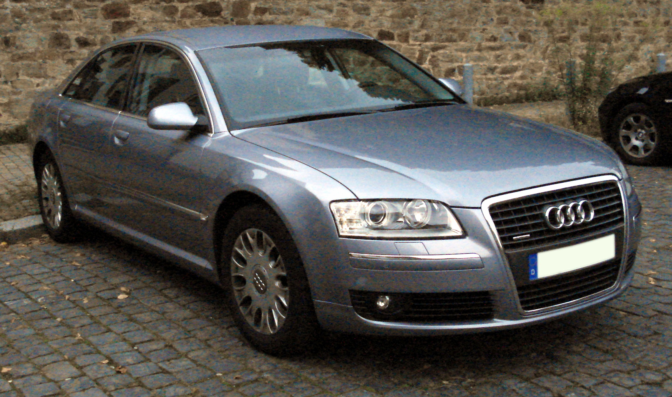 Audi A8